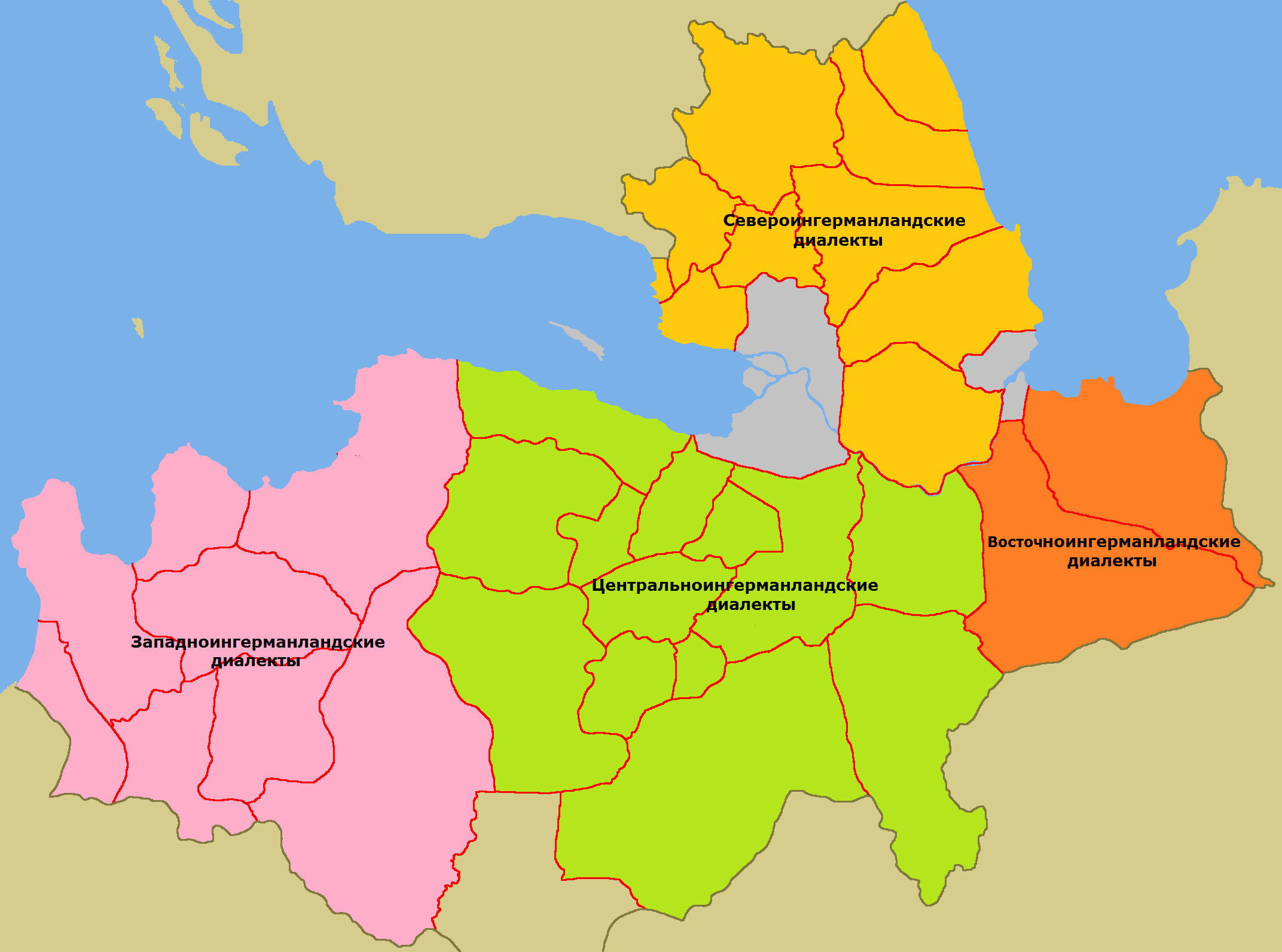 Карта распределения ингерманландских диалектов. Сделана на основе работы Муслимов М. З. К классификации финских диалектов Ингерманландии. СПб, 2009. ISBN 978-5-02-025585-2